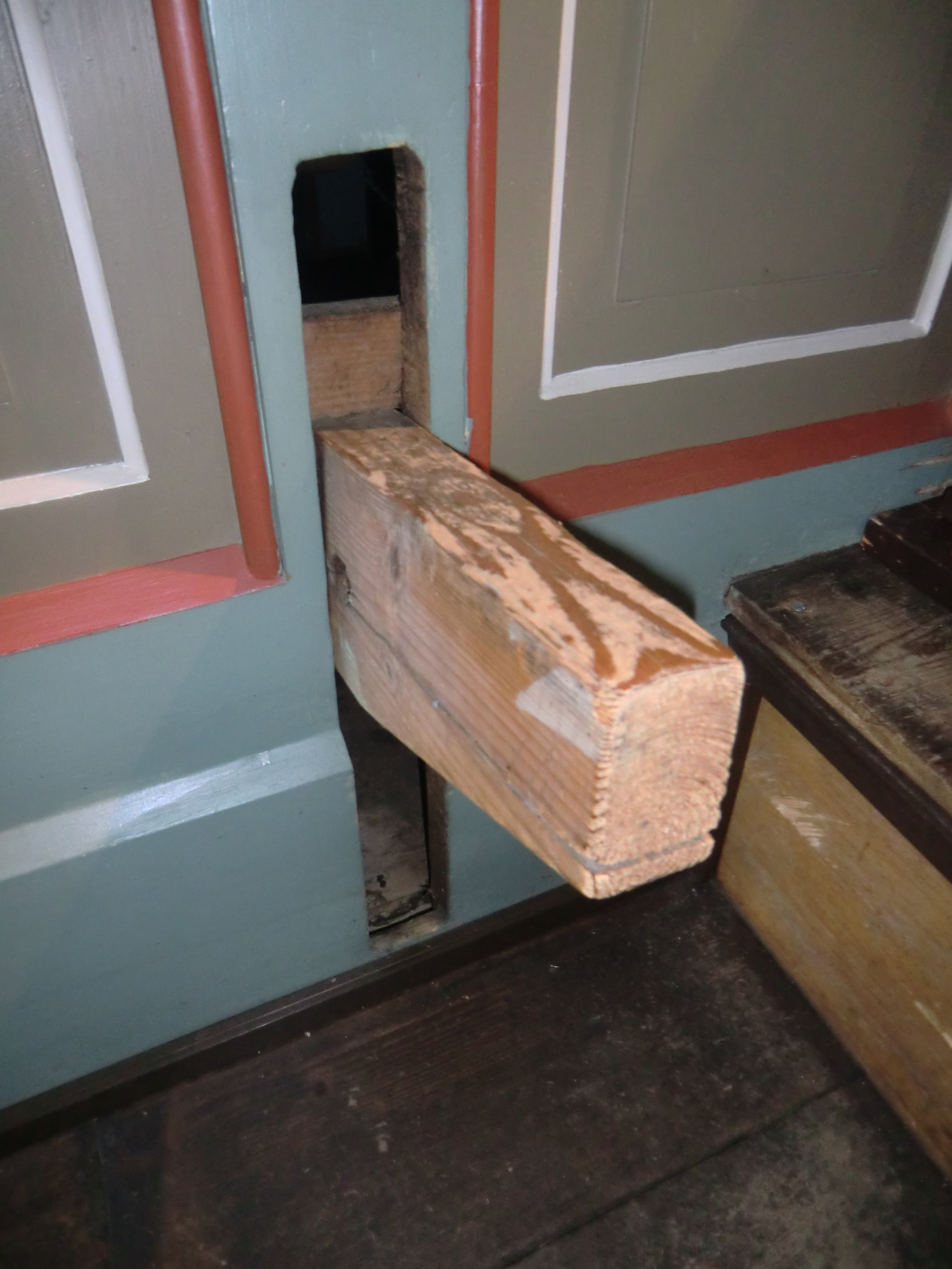 Keller-Orgel Kransberg (1876) - Kalkantentritt (neben dem Spieltisch)